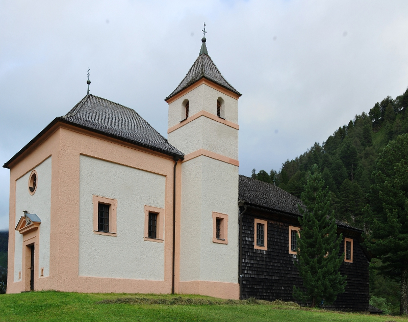 Katholische Filialkirche hl Petrus in Banden, Obertauern KG Untertauern